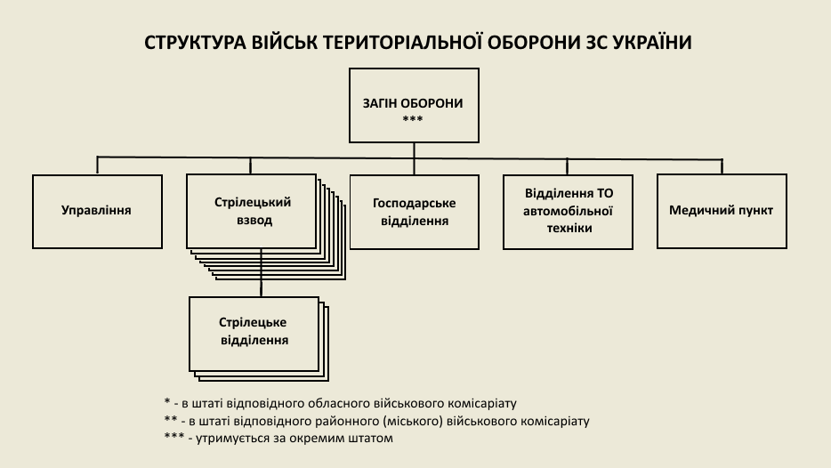 Схема, Структура загону оборони територіальної оборони